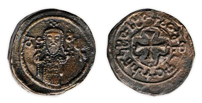 დავით აღმაშენებლის მონეტა, მოჭრილი სავარაუდოდ, 1118-1125 წლებში. სპილენძი 10,73 გრ. 33 მმ., ბრიტანეთის მუზეუმი, ლონდონი